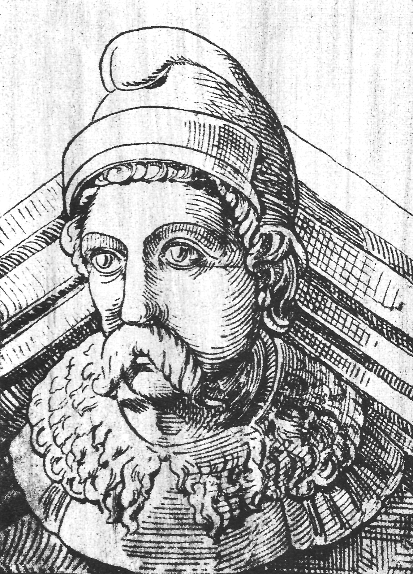 Heinrich Schickhardt (Zeichnung eines architektonischen Elemtes aus dem Neuen Lusthaus in Stuttgart)